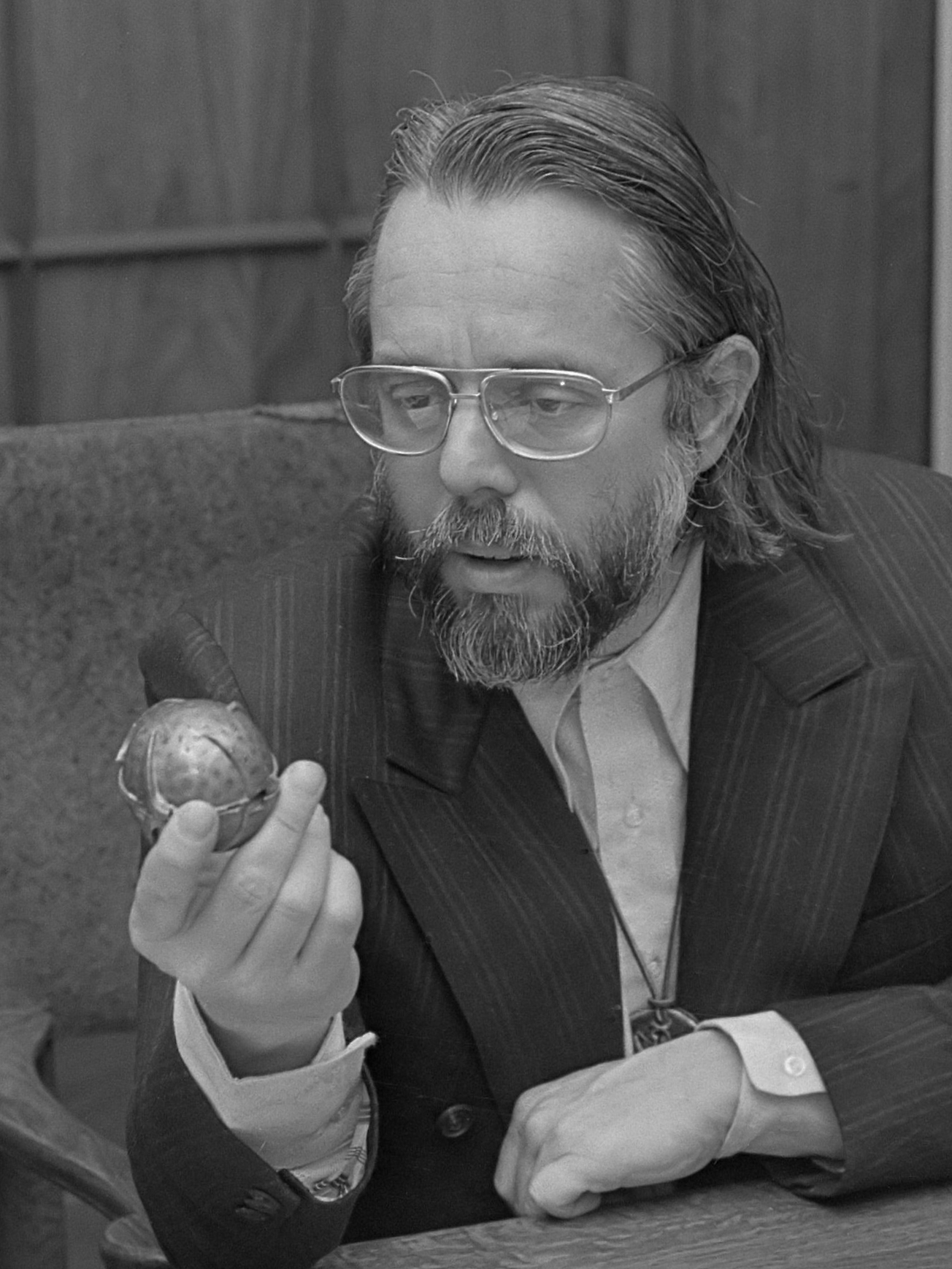 Delegatie van Amerikaanse Raad van Kerken spreekt met Nederlandse Kerken over bombardementen in Vietnam, prof. Harvey Cox toont fragmentatiebom van Honeywell 9 januari 1973